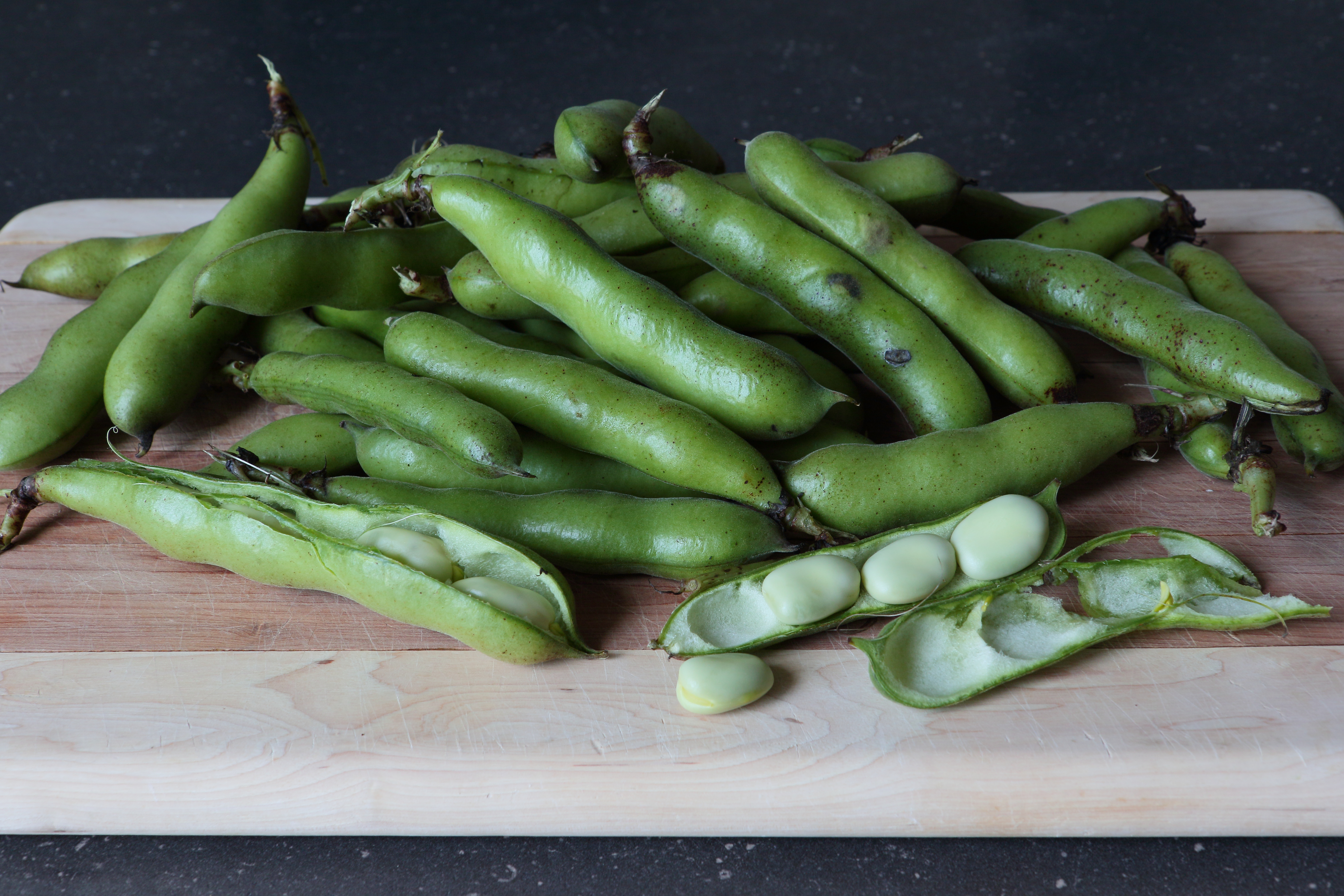 Gourganes des Serres Naturo, La Durantaye, Québec, Canada